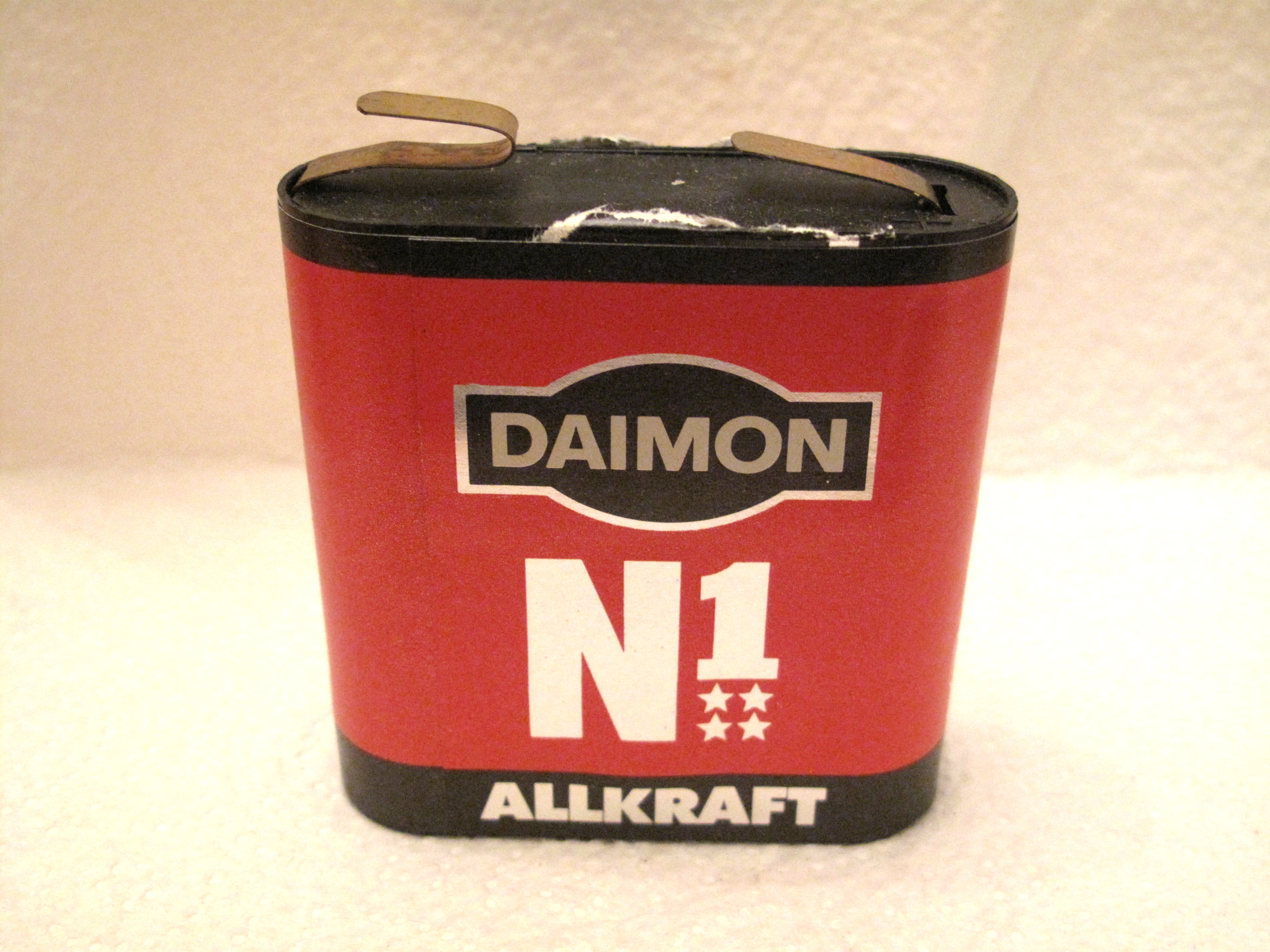 DAIMON Flachbatterie, 80er-Jahre